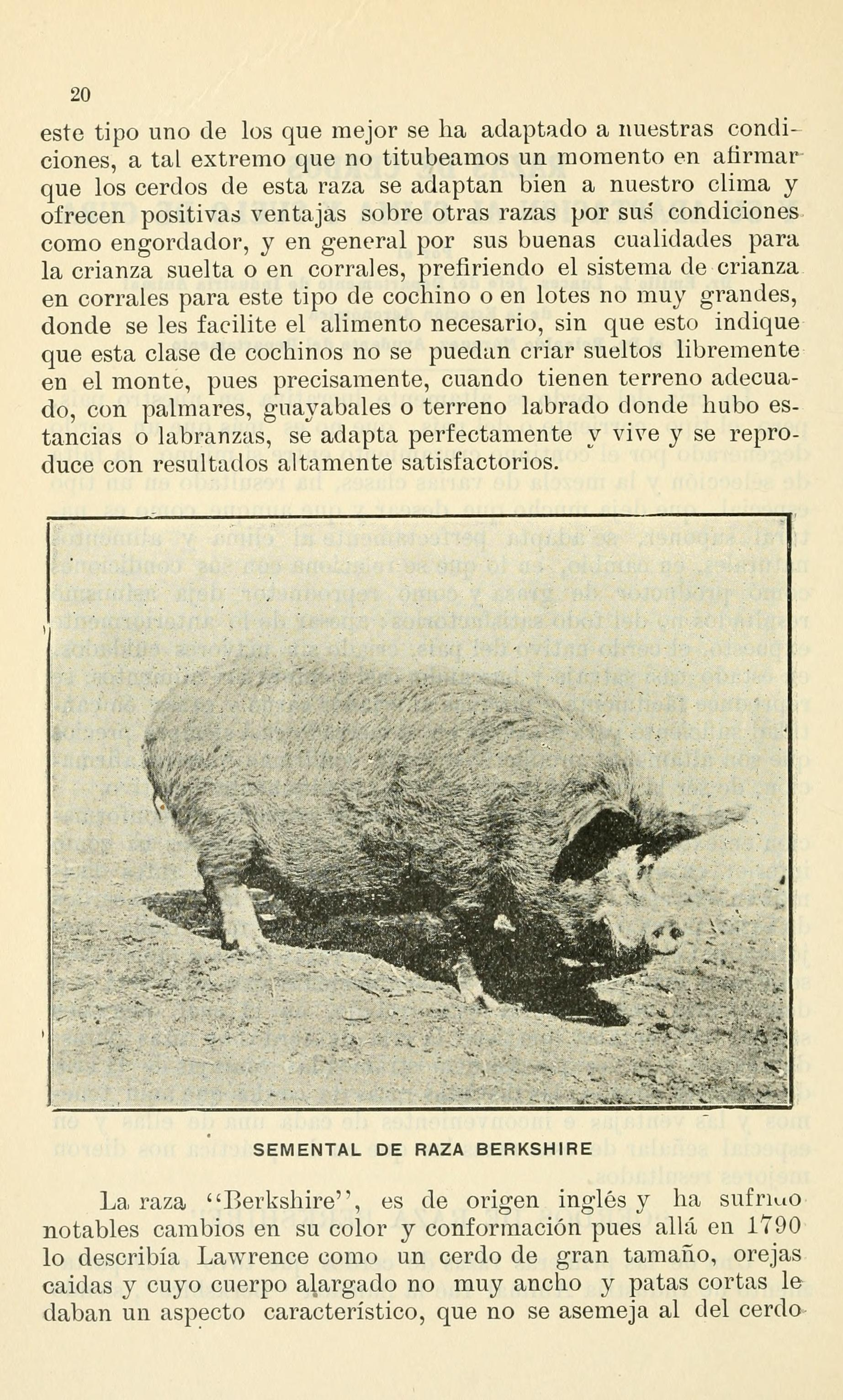 Circular / República de Cuba, Secretaría de Agricultura, Comercio y Trabajo, Estación Experimental Agronómica ...